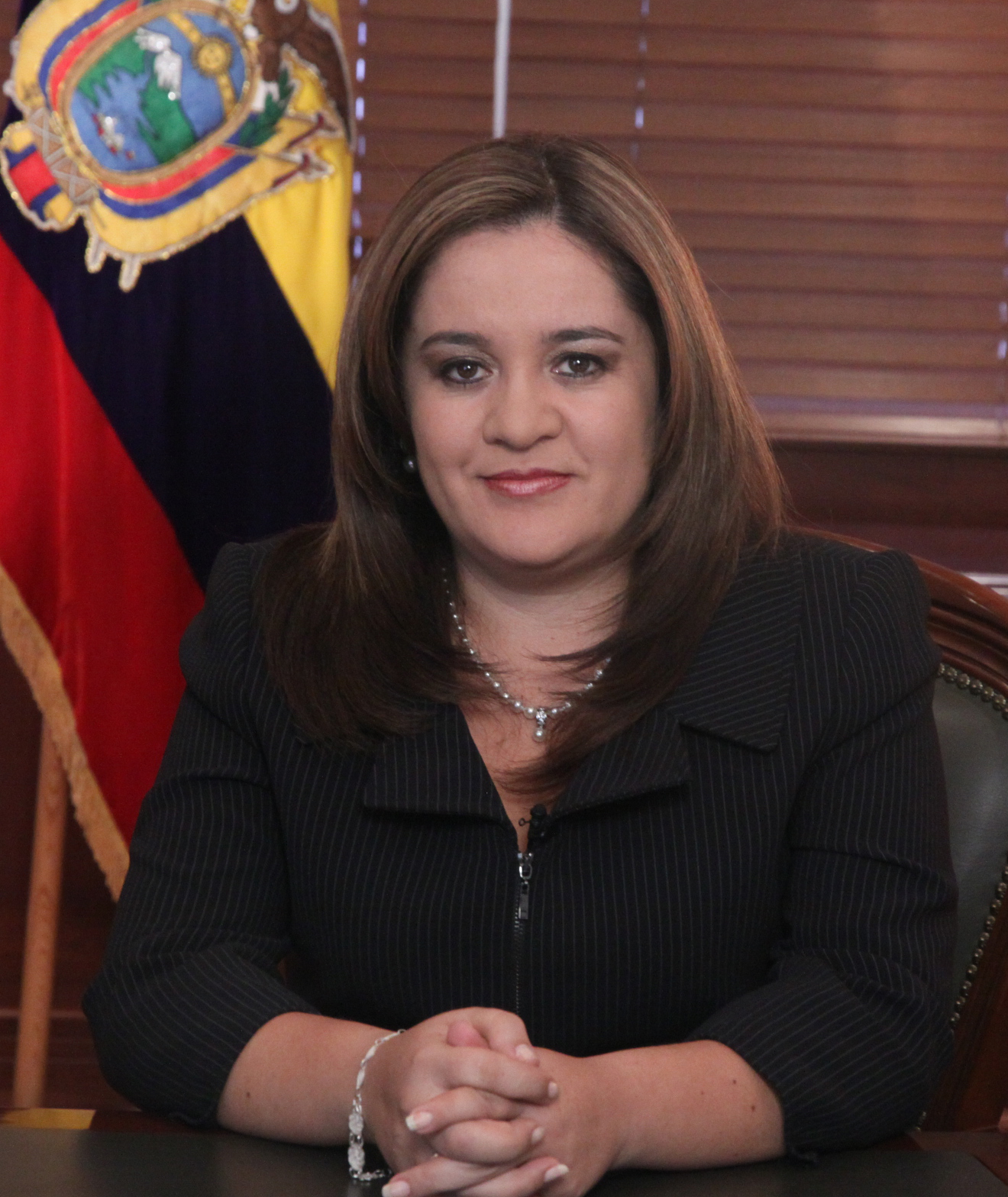 Irina Cabezas en 2010 como Presidenta encargada de la Asamblea Nacional.